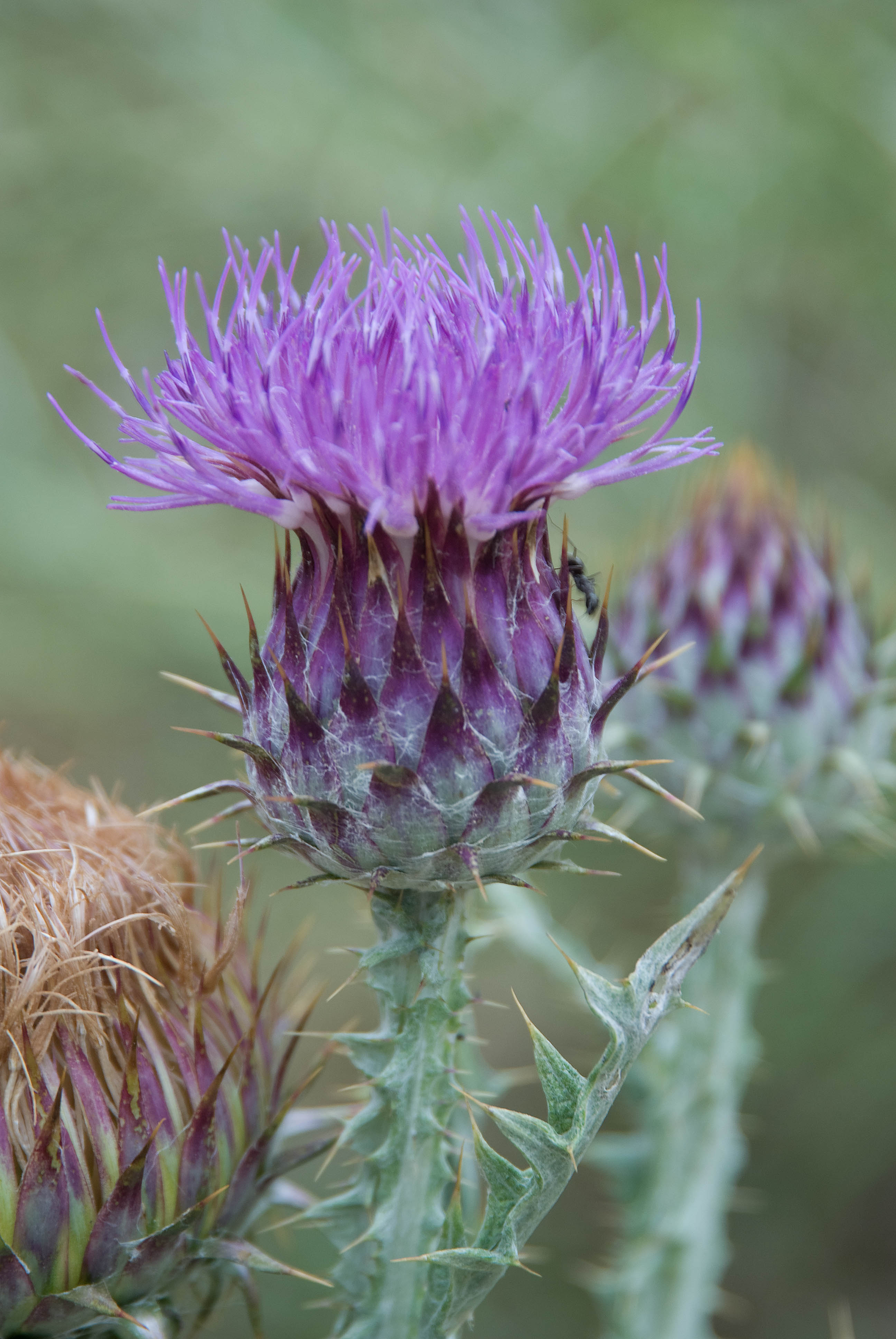 цвет чичка, снимљено у Двиграду, Истра Onopordum nervosum